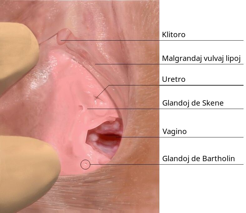 Foto de vulvo, vagina enirejo kaj la glandoj de Skene kaj Bartholin.